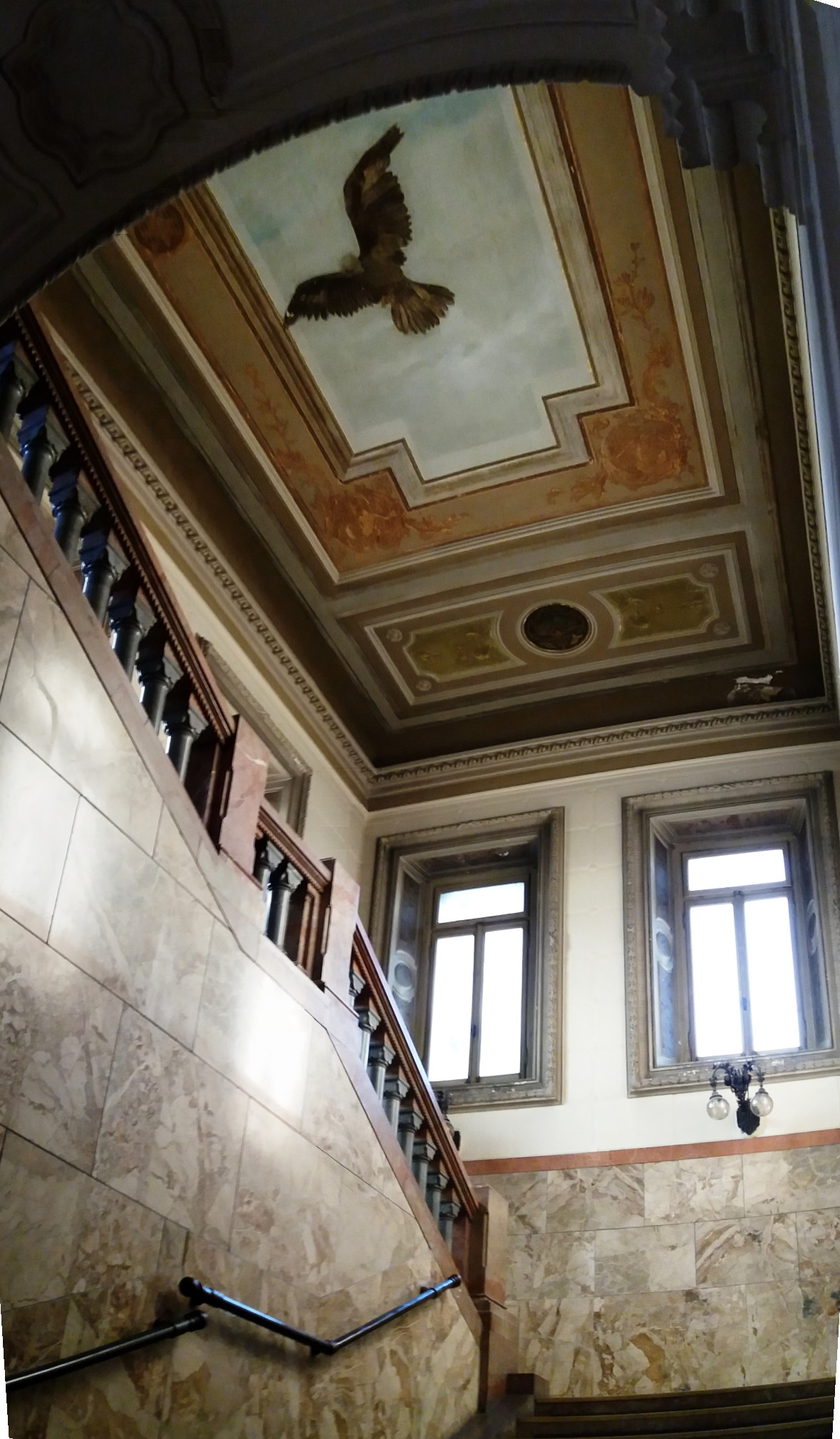 con lo stemma della famiglia Ottolini This is a photo of a monument which is part of cultural heritage of Italy.